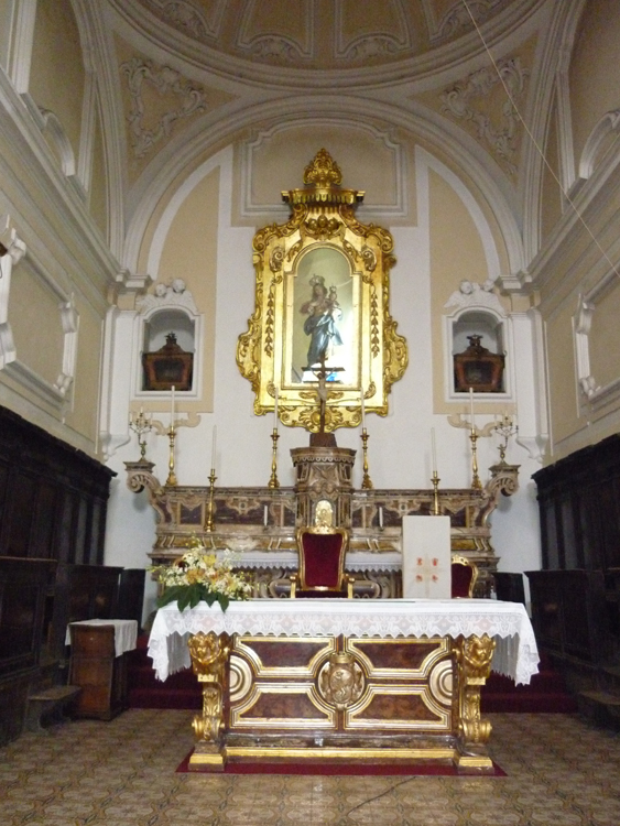 San Giovanni in Fiore - Chiesa Madre, altare